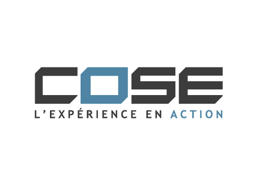 Logo de COSE Inc.